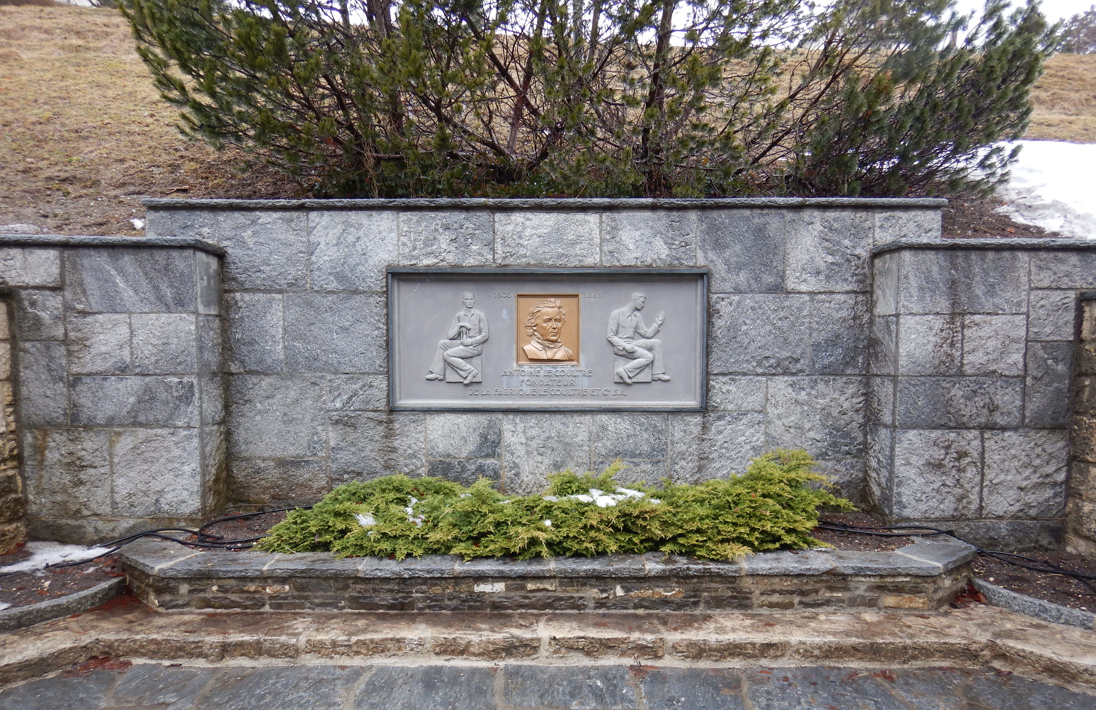 Monument près de la manufacture de Jaeger-LeCoultre pour Antoine Le Coultre, 1803-1881, Fondateur de la Fabrique Le Coultre et Cie. S.A.